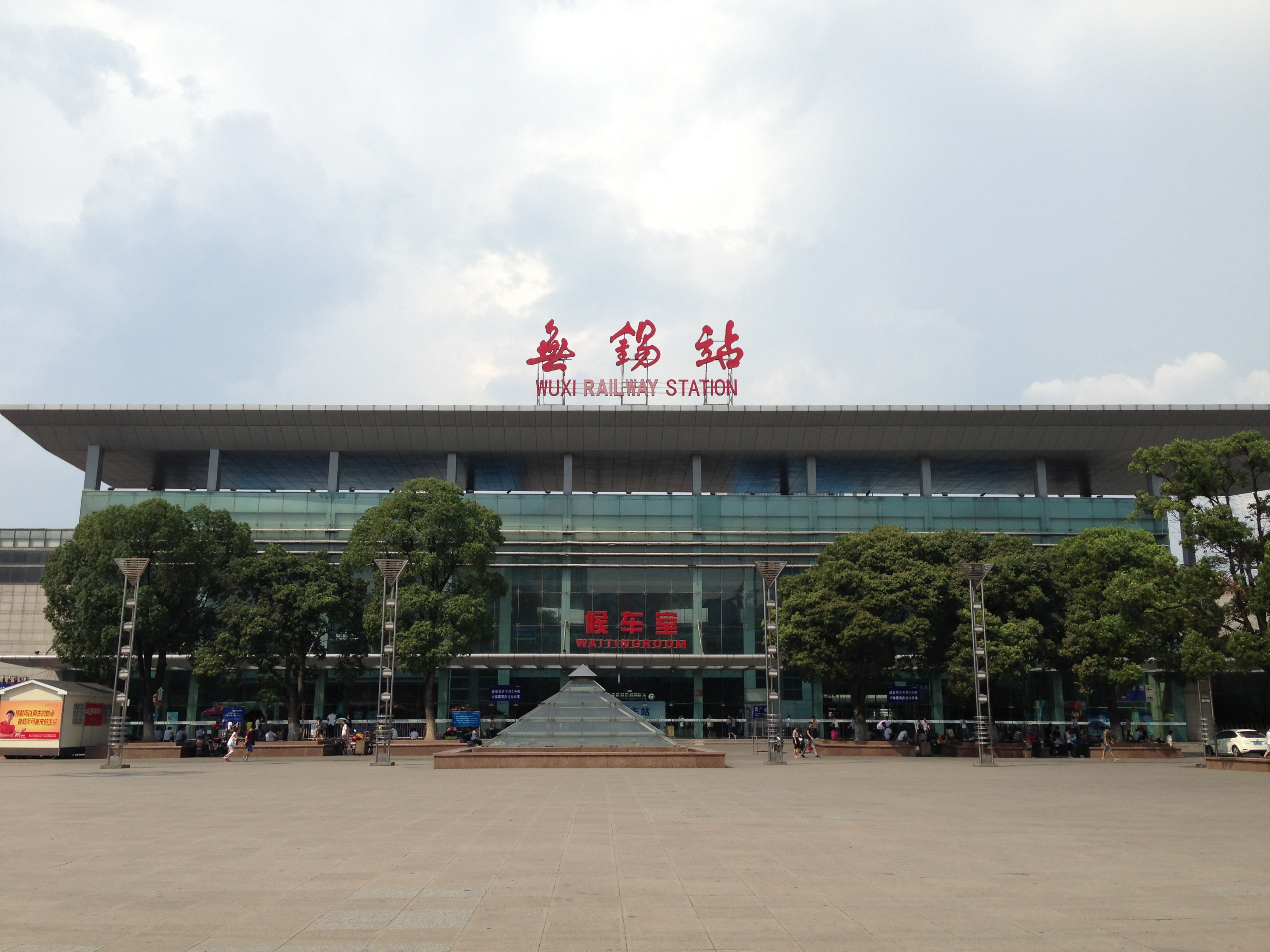 中文（中国大陆）: 无锡站南广场